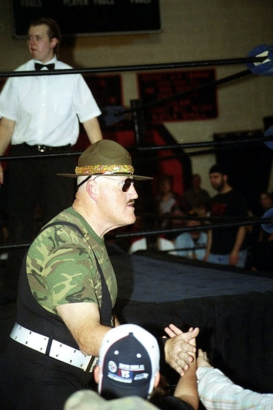 Wrestling legend Sgt. Slaughter on 3/28/09 from Franklin PA